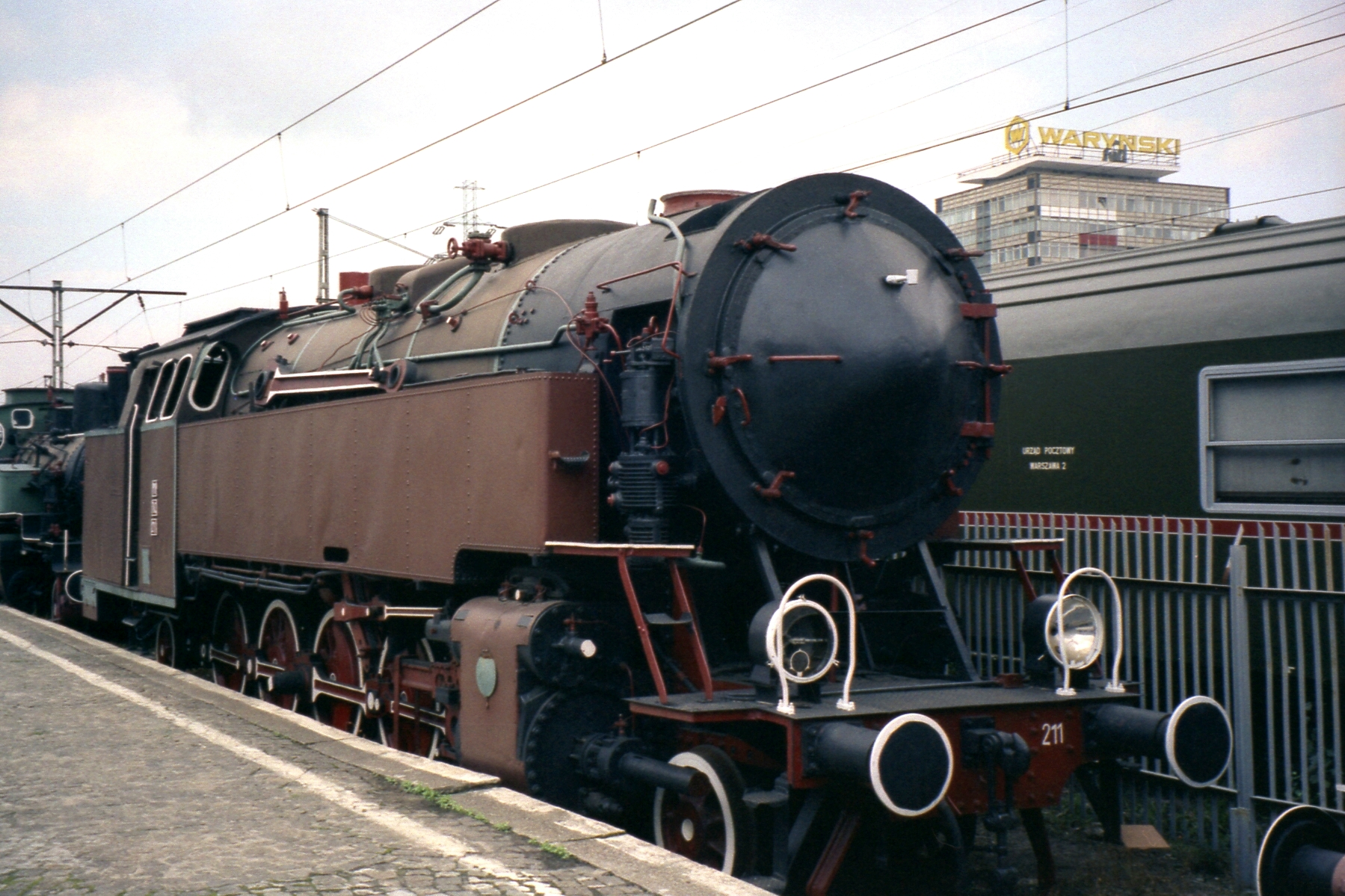 Dampflokomotive TKz-211 der PMP Warszawa 06.09.94